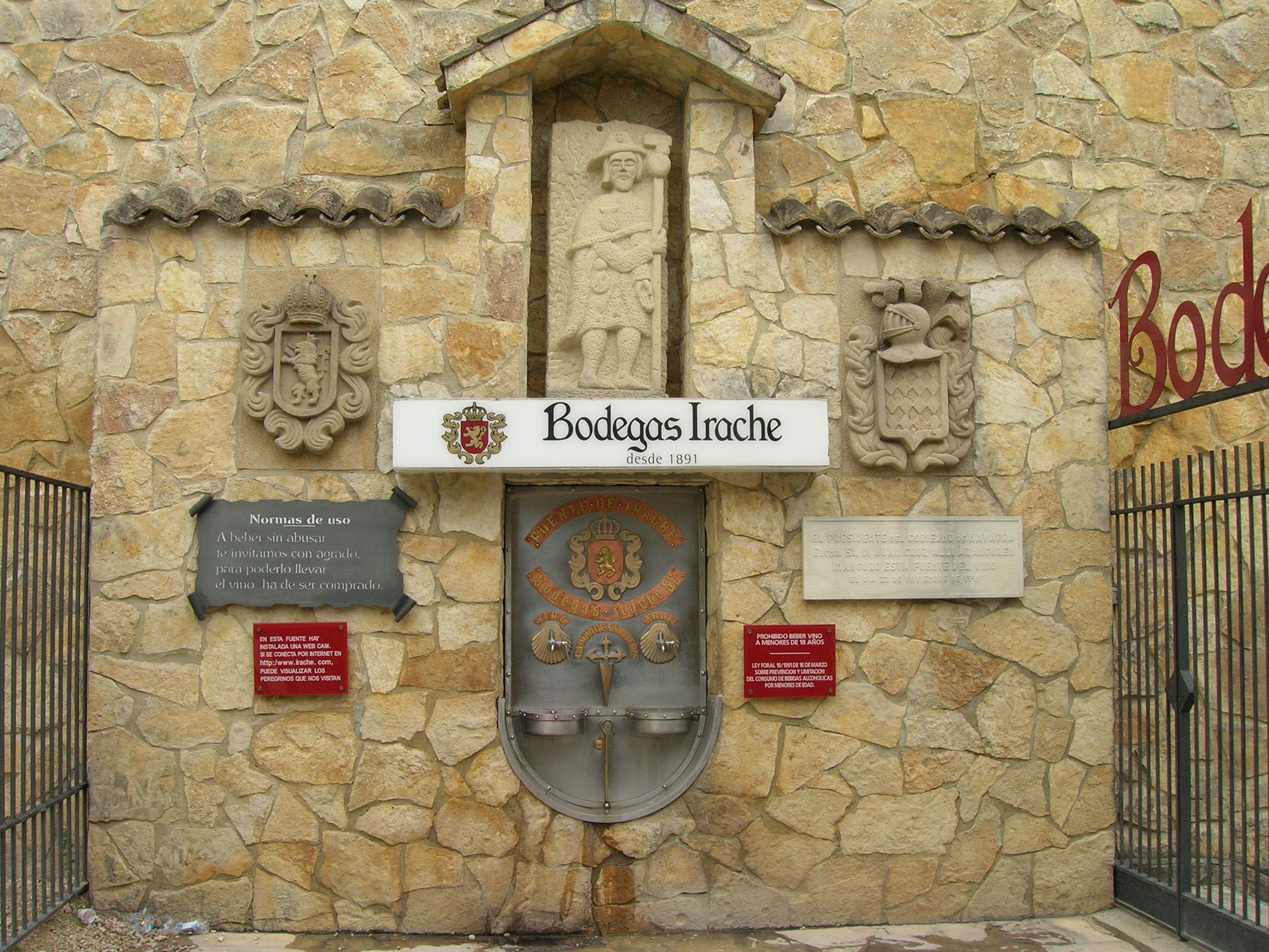 Aquí está. La fuente del vino de Bodegas Irache. Muchos dicen que te da fuerzas para continuar el Camino. Yo no se si me dio fuerzas, pero si bastante alegría hasta finalizar la etapa en Villamayor de Monjardín. Vuela hasta esta localización (Necesitas Google Earth)